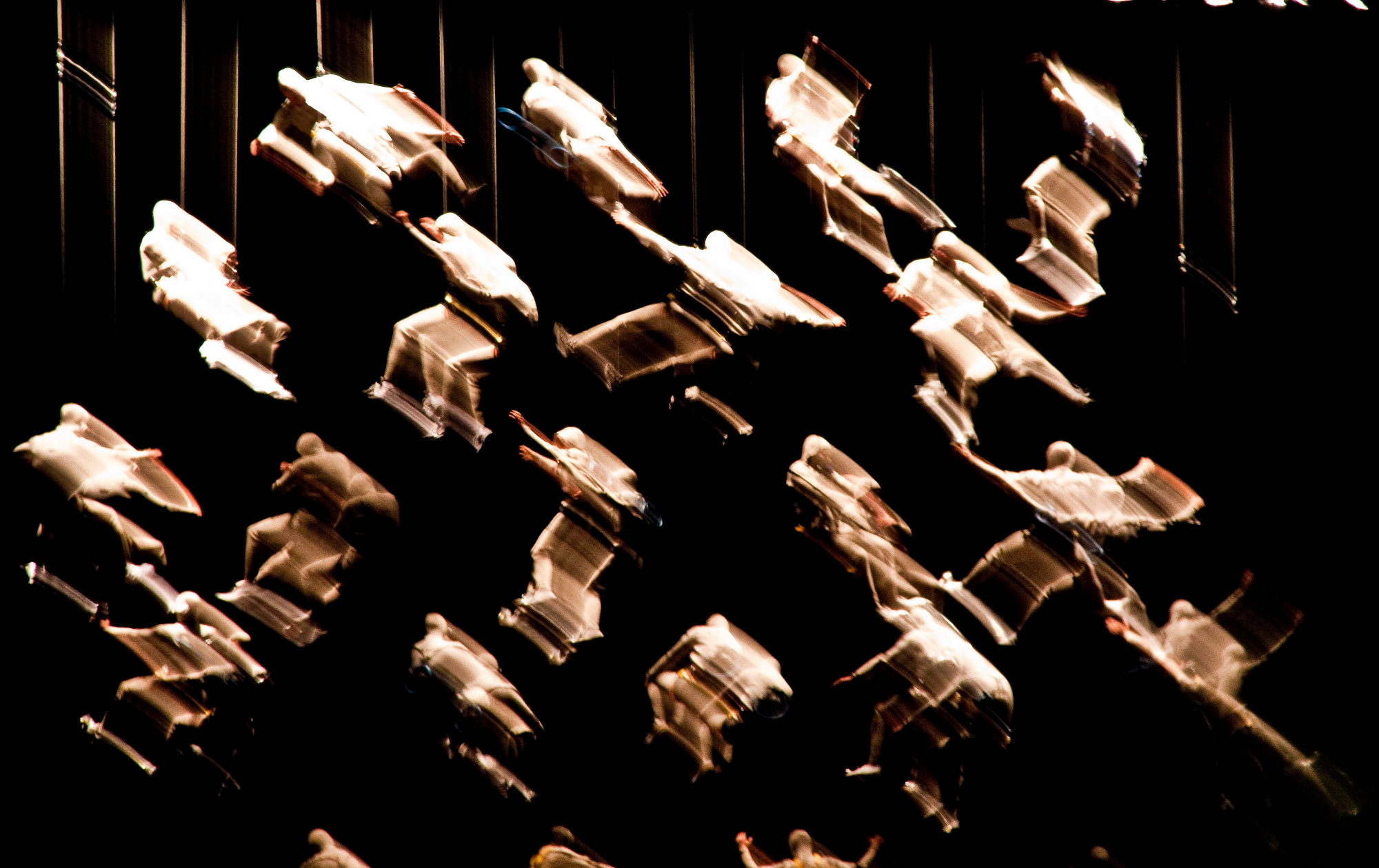 Las Fura dels Baus in Dreams In Flight.